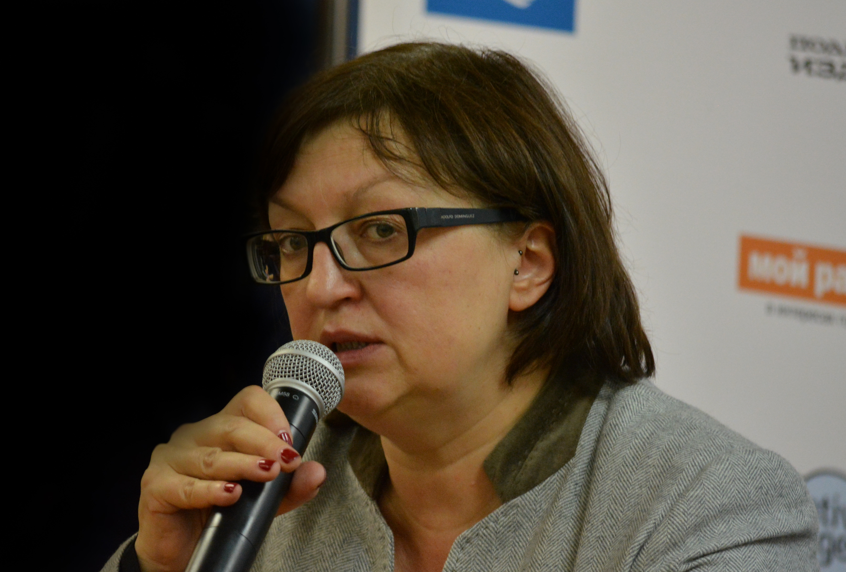 Галина Тимченко на дебатах в рамках «Открытой библиотеки» в Центральной городской публичной библиотеке им. В. В. Маяковского (Санкт-Петербург) 27 сентября 2014 года